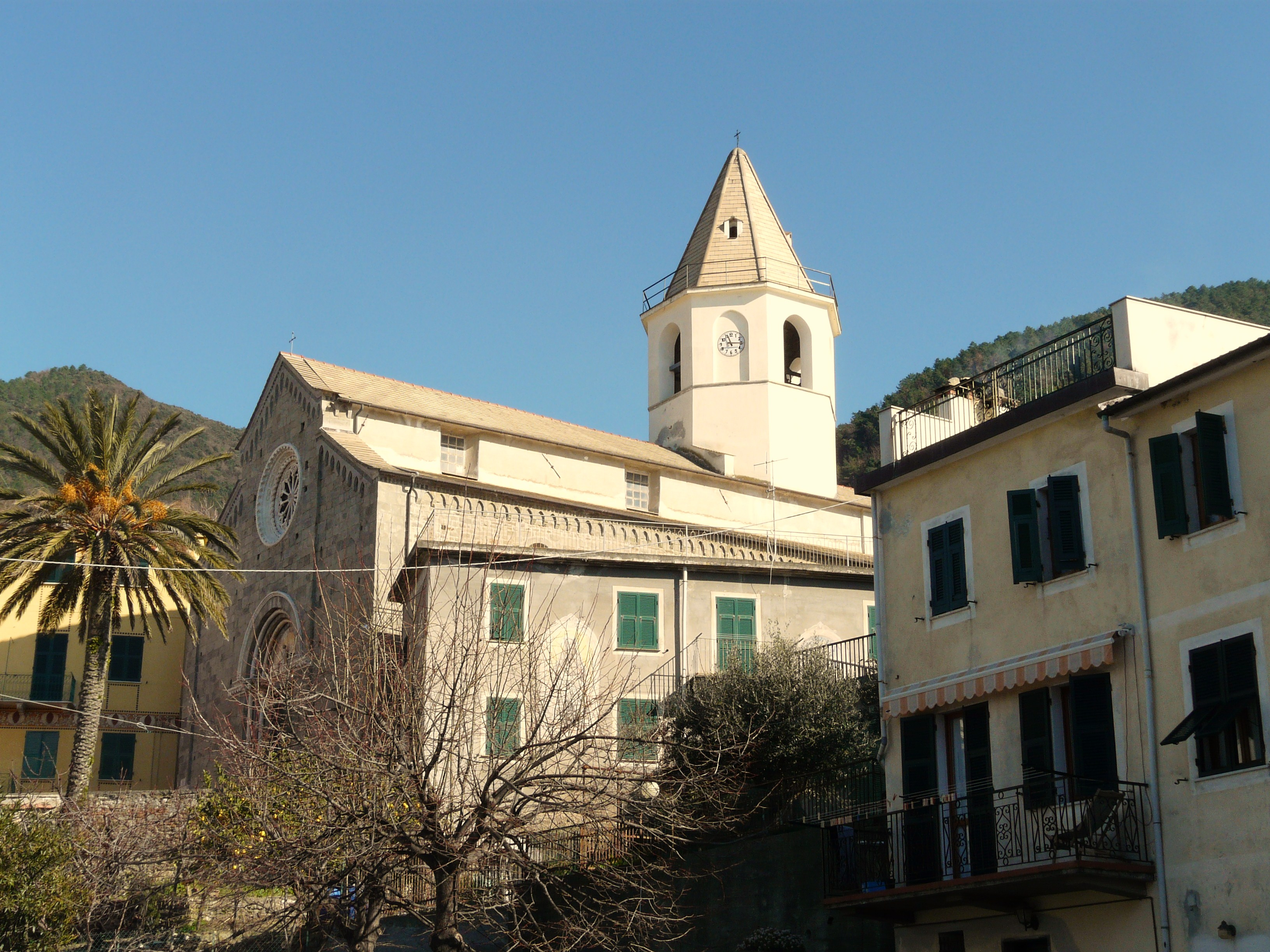 Chiesa di San Pietro, Corniglia, Cinque Terre, La Spezia, Liguria, Italia